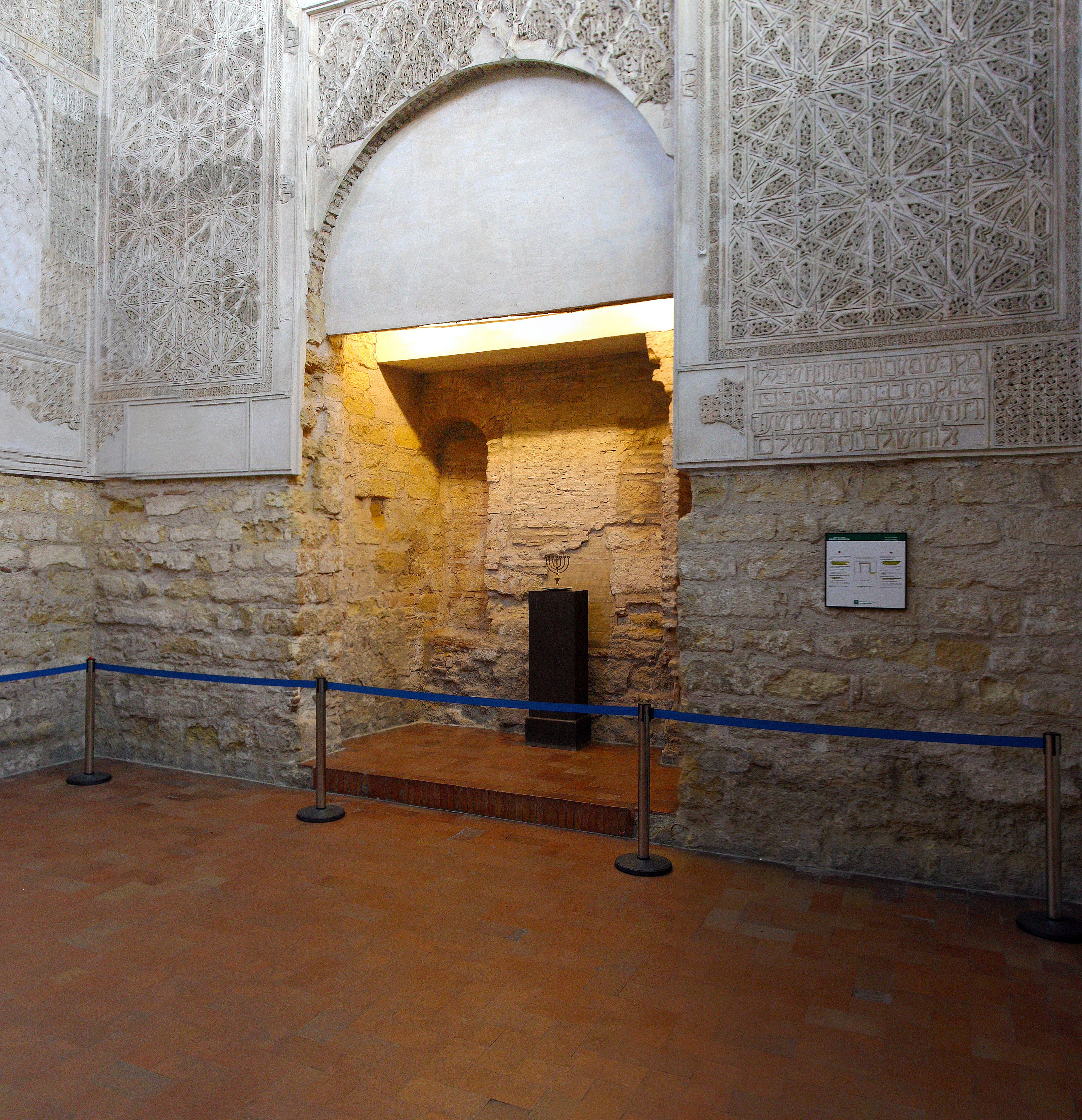 Córdoba (España).